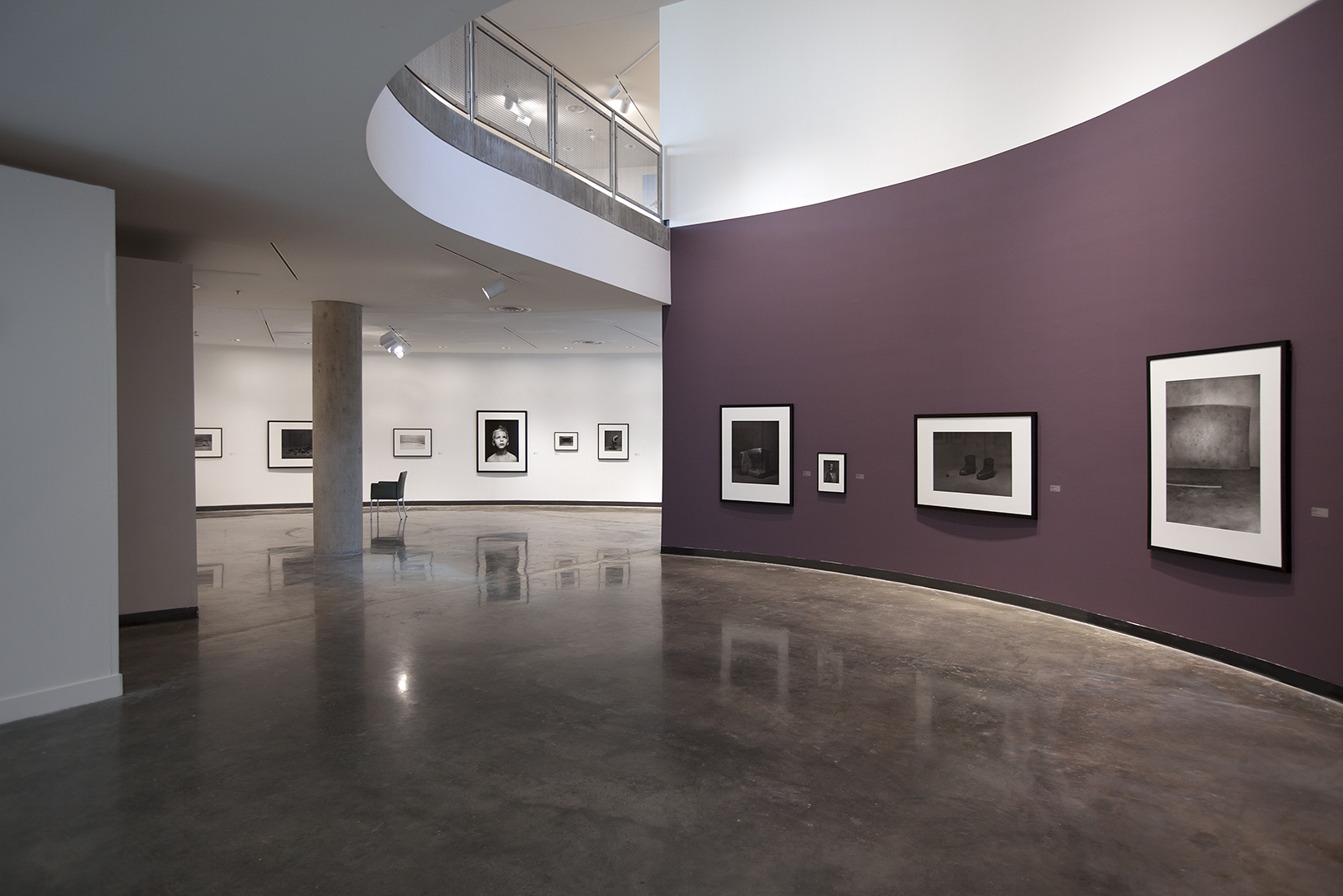 výstava Ivana Pinakvy